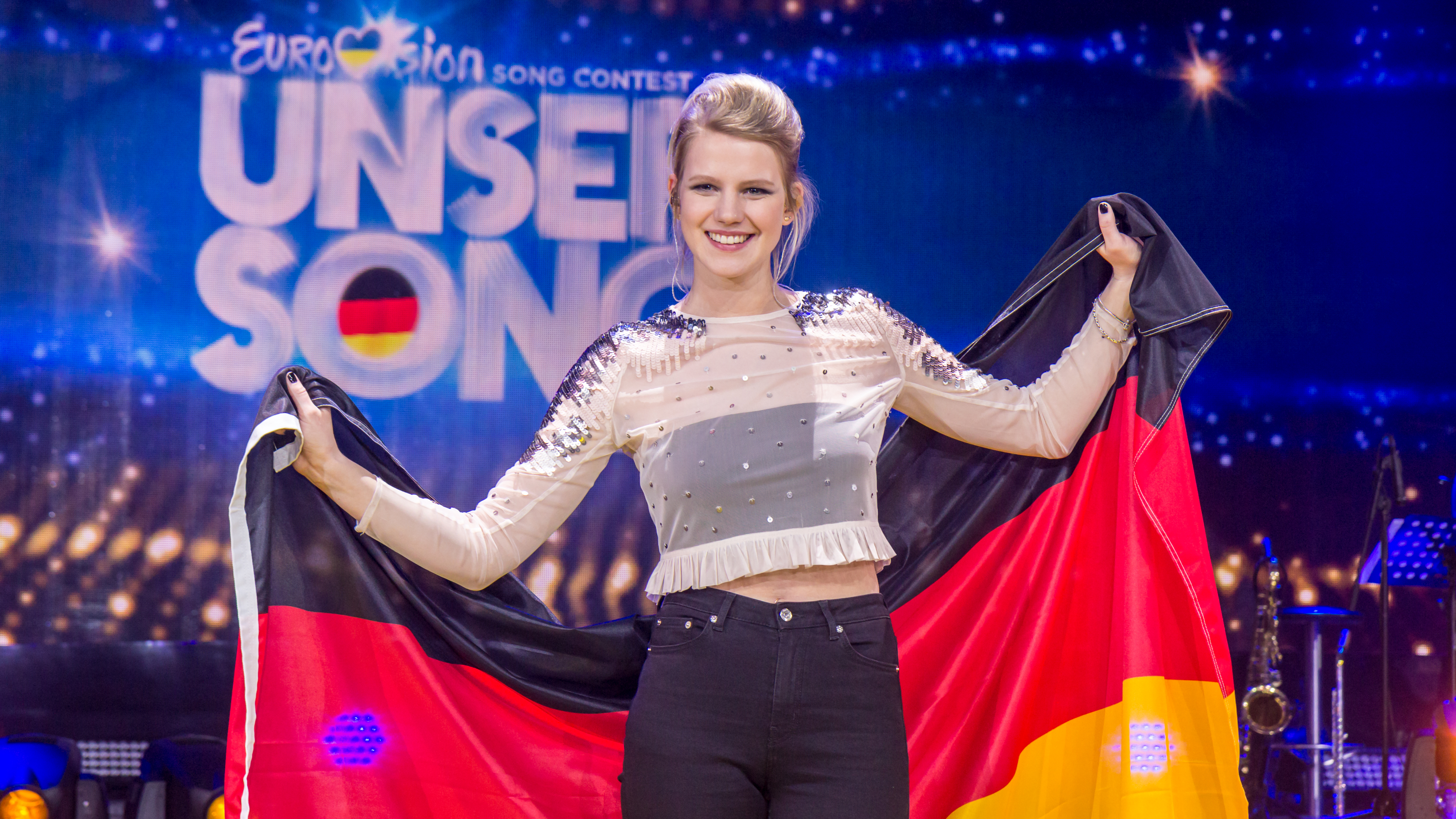 Unser Song 2017 - Glückwünsche und Pressekonferent nach der Sendung